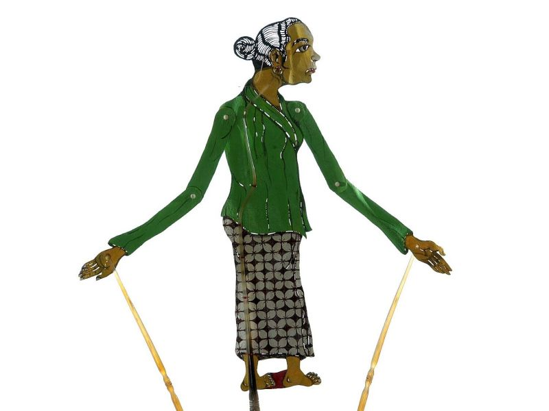 Schaduwpop. Wajang Kantjil pop dochter van de boer